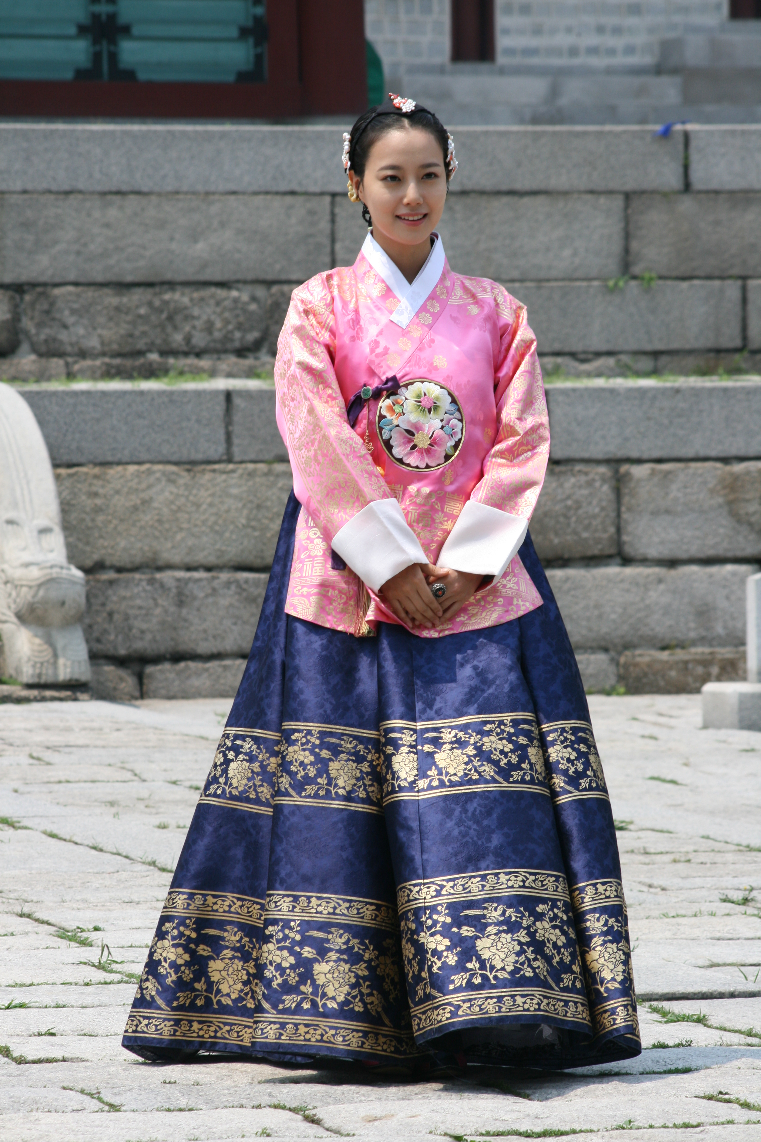 2011년 6월 28일 경복궁에서 진행된 KBS 수목드라마 《공주의 남자》 포스터 촬영.